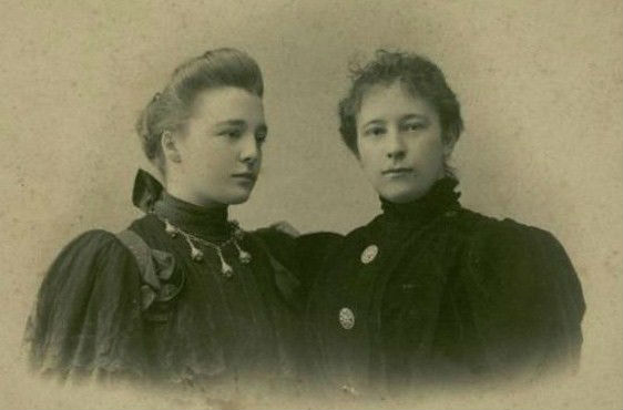 Графини Соллогуб, Елена Фёдоровна (1874—1935) и Вера Фёдоровны (1875—после 1931).